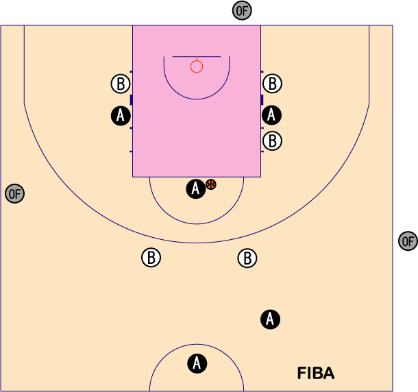 FIBA free throw position A:thrower Team B:Opponent Team OF:Official